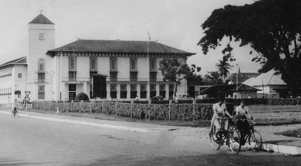 Balai kota Padang tempo doeloe